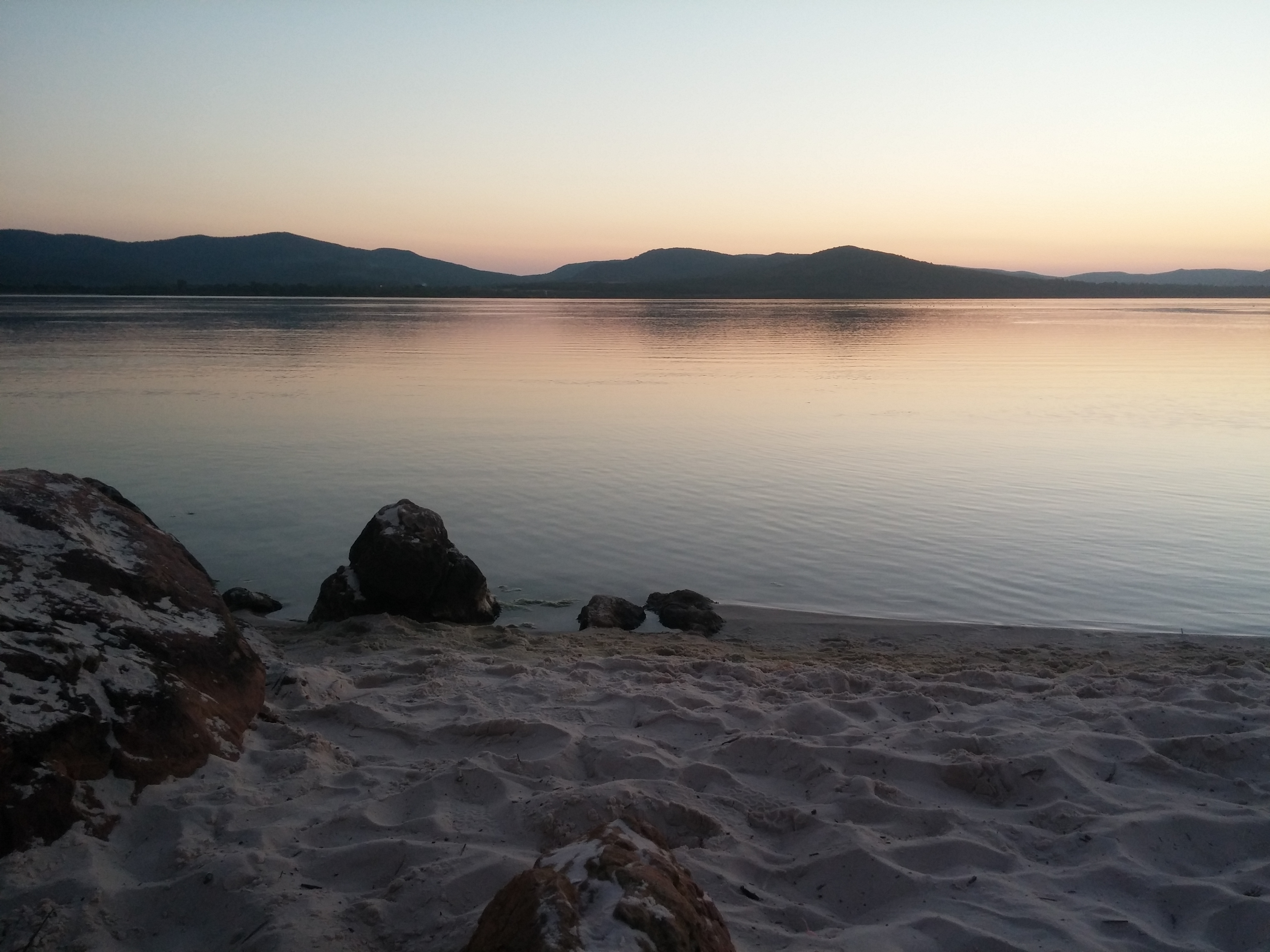 Lac des oiseaux et la beauté de son sable